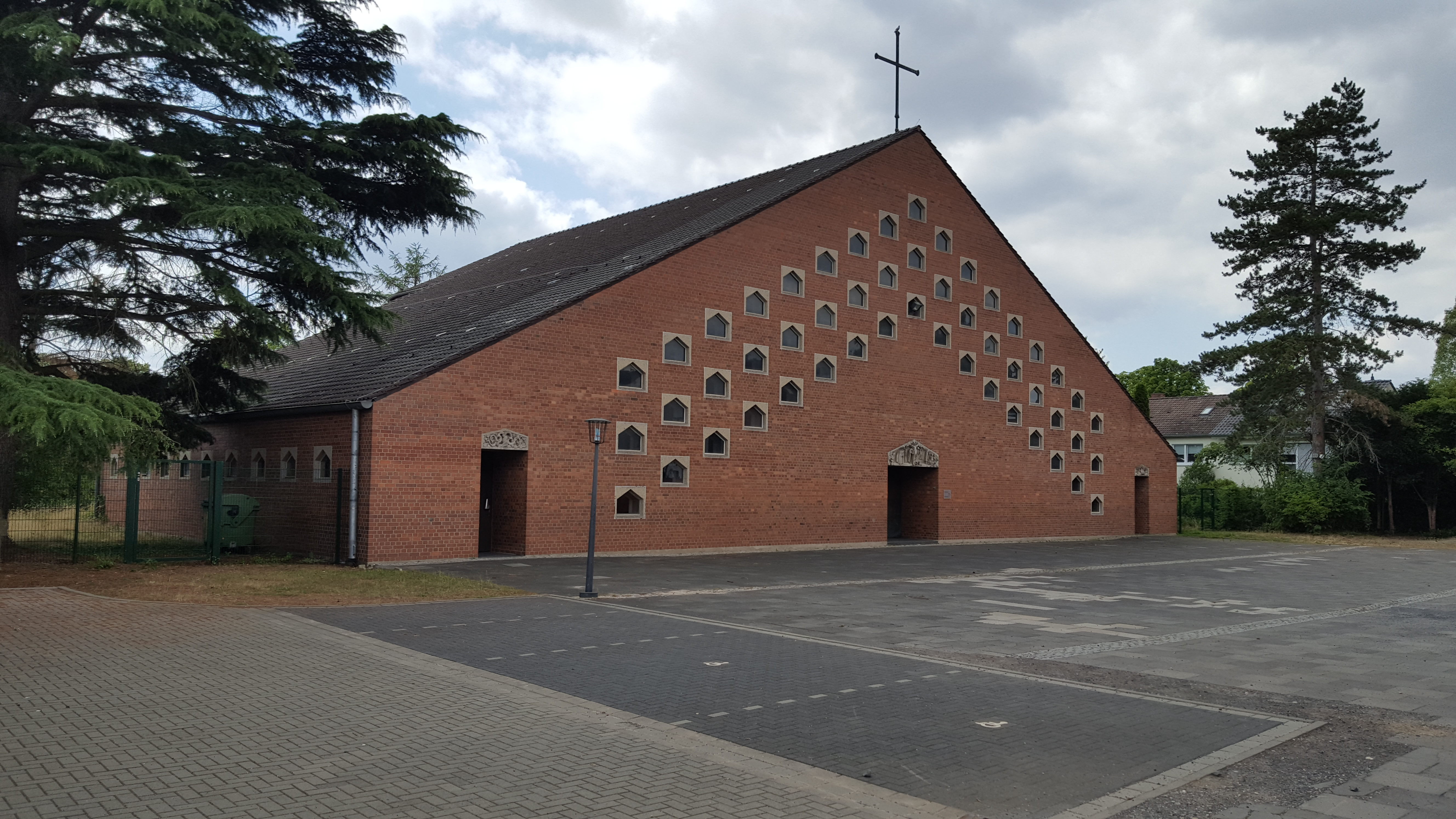 Bad Godesberg, Juli 2019